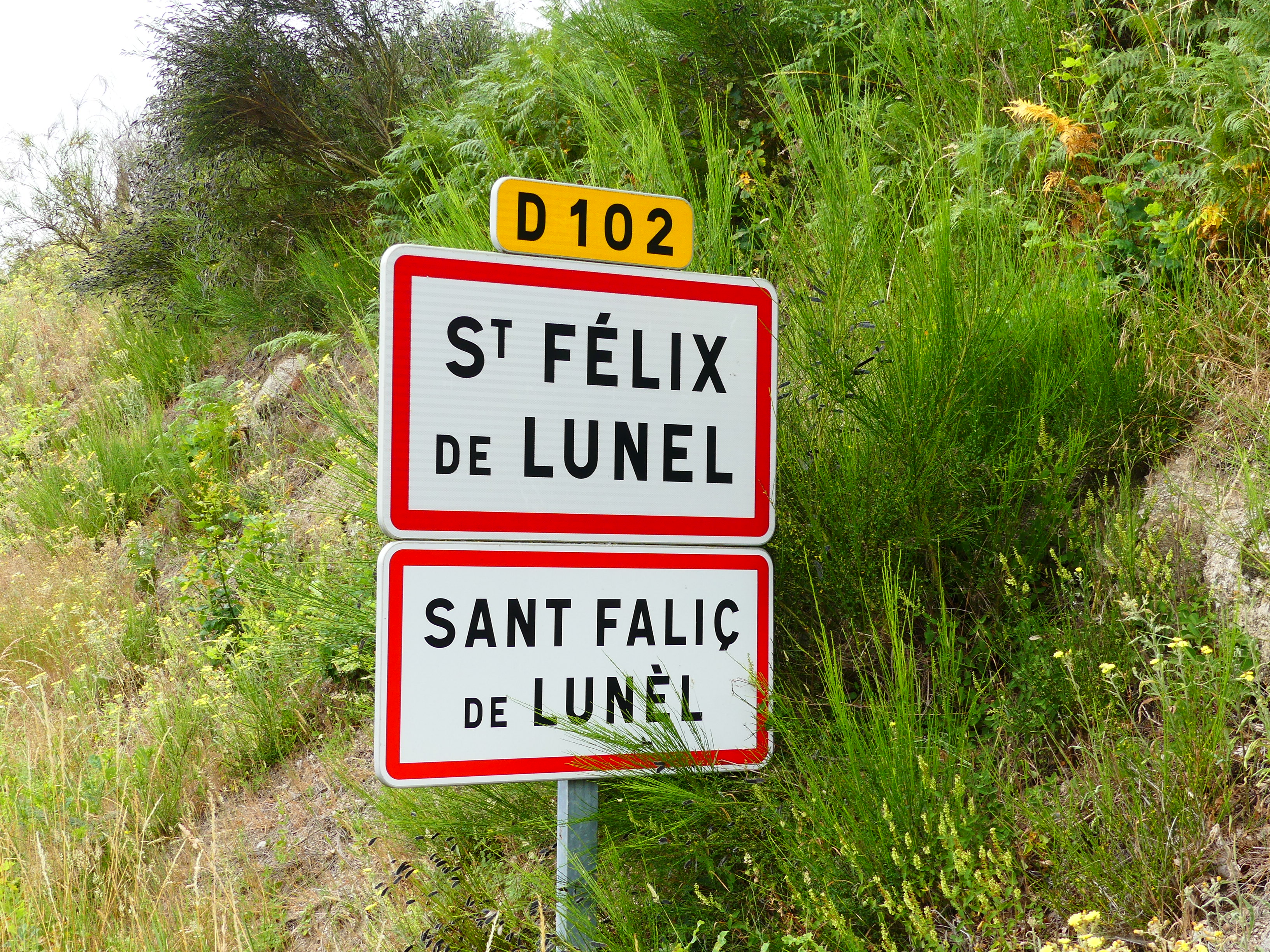 Panneau d'entrée à Saint-Félix-de-Lunel, Aveyron, France.